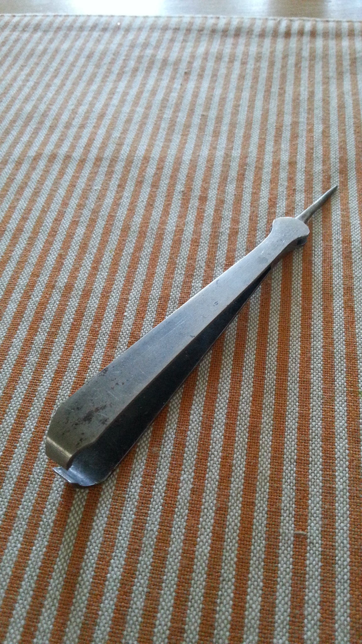 Putzeisen, 13cm lang.